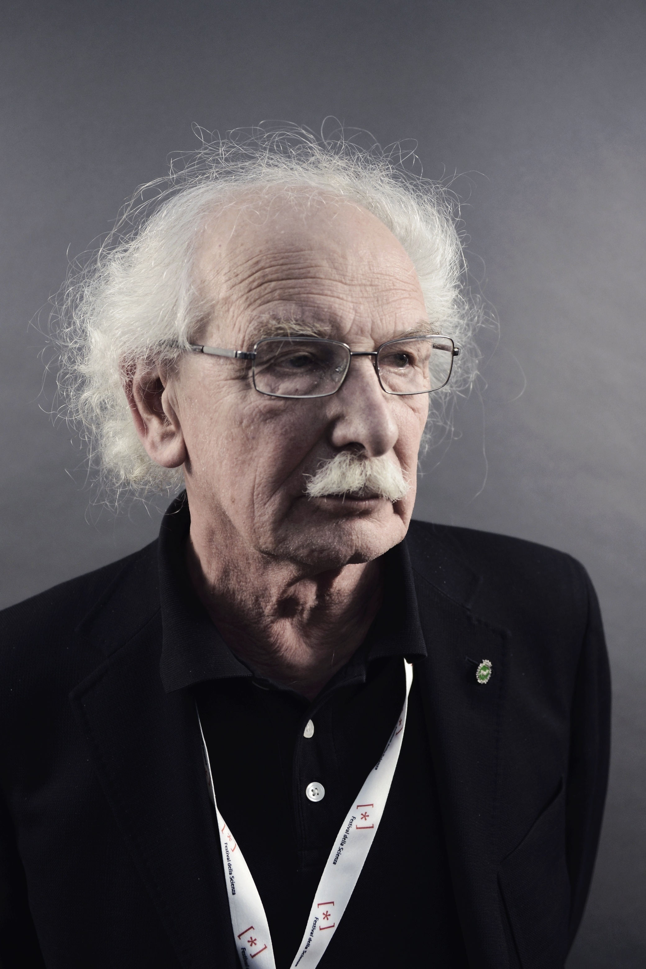 Giacomo Rizzolatti (Kiev, 28 aprile 1937) è un neuroscienziato italiano.